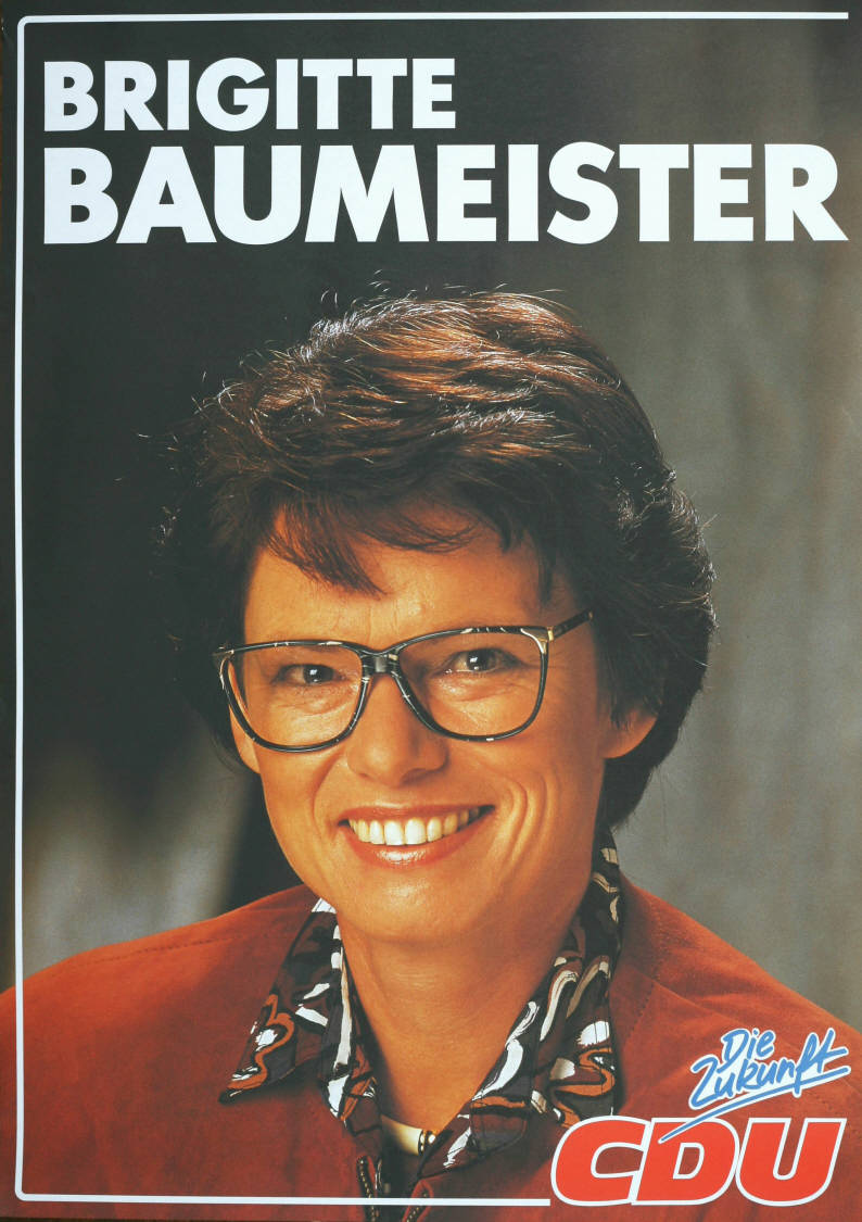 Brigitte Baumeister Die Zukunft CDUAbbildung:PorträtfotoPlakatart:Kandidaten-/Personenplakat mit PorträtObjekt-Signatur:10-001: 3522Bestand:Plakate zu Bundestagswahlen (10-001)GliederungBestand10-18:Plakate zu Bundestagswahlen (10-001) » Die 12. Bundestagswahl am 2. Dezember 1990 » CDU » Mit PorträtfotoLizenz:KAS/ACDP 10-001: 3522 CC-BY-SA 3.0 DE